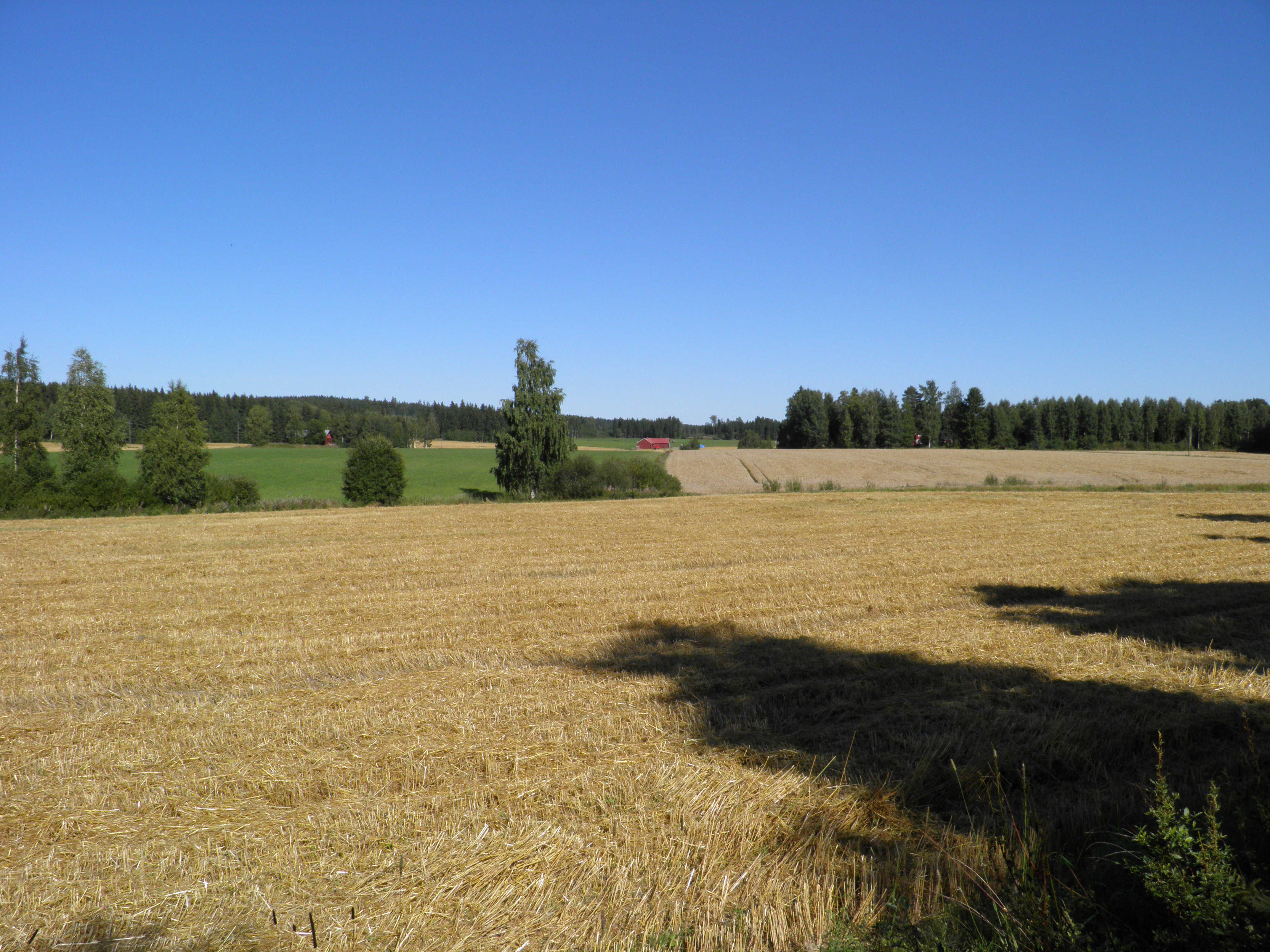 Järvenpään kylän aluetta Hämeenkoskella.